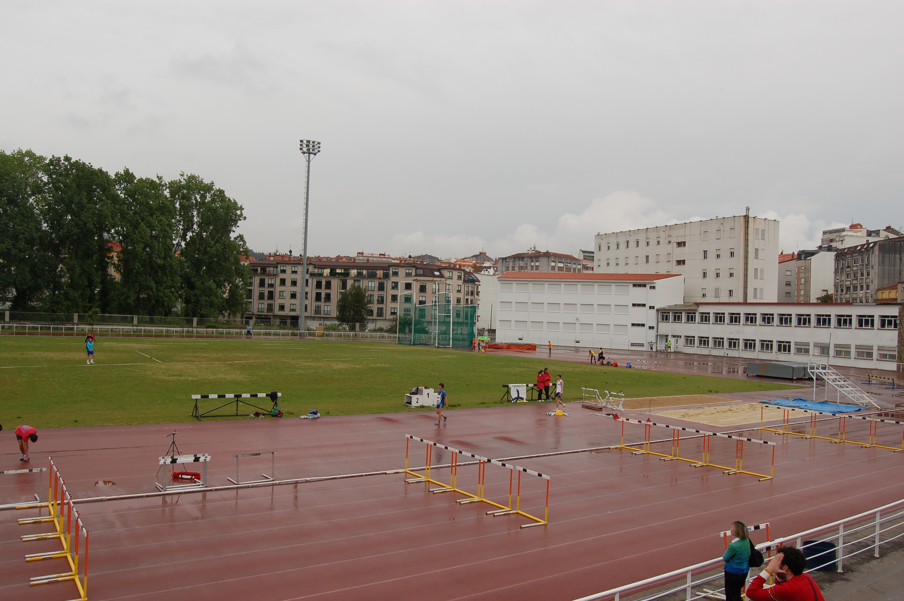 Centro Galego de Tecnificación Deportiva, en Pontevedra.